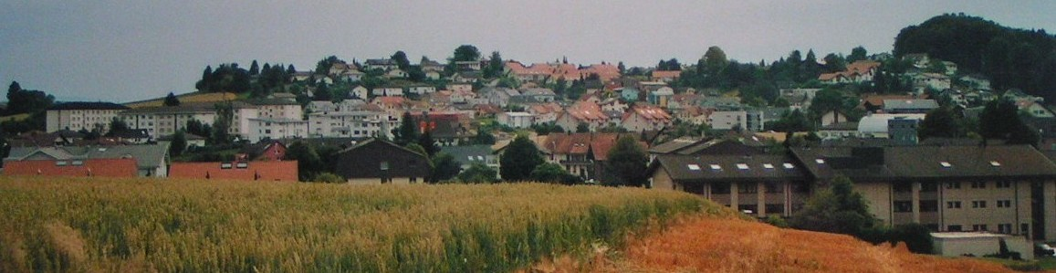 Oberer Dorfteil